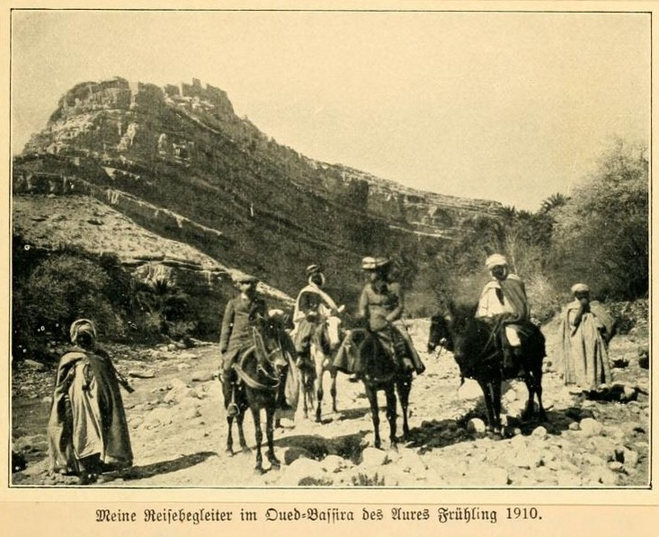 “Frühling 1910, im Oued-Bassira” - from Expeditionsbericht der Zweiten Deutschen Inner-Afrika-Expedition (1907-09) Auf dem wege nach Atlantis.